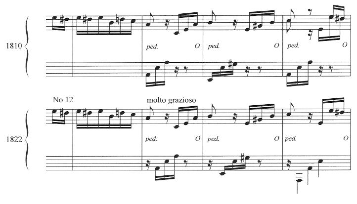 Ludwig van Beethoven: BH 116, Skizzen zu WoO 59 ("Für Elise") (1810/1822), Transkription und Vergleich der Fassungen von 1810 und 1822. Edition von User:Dr. 91.41